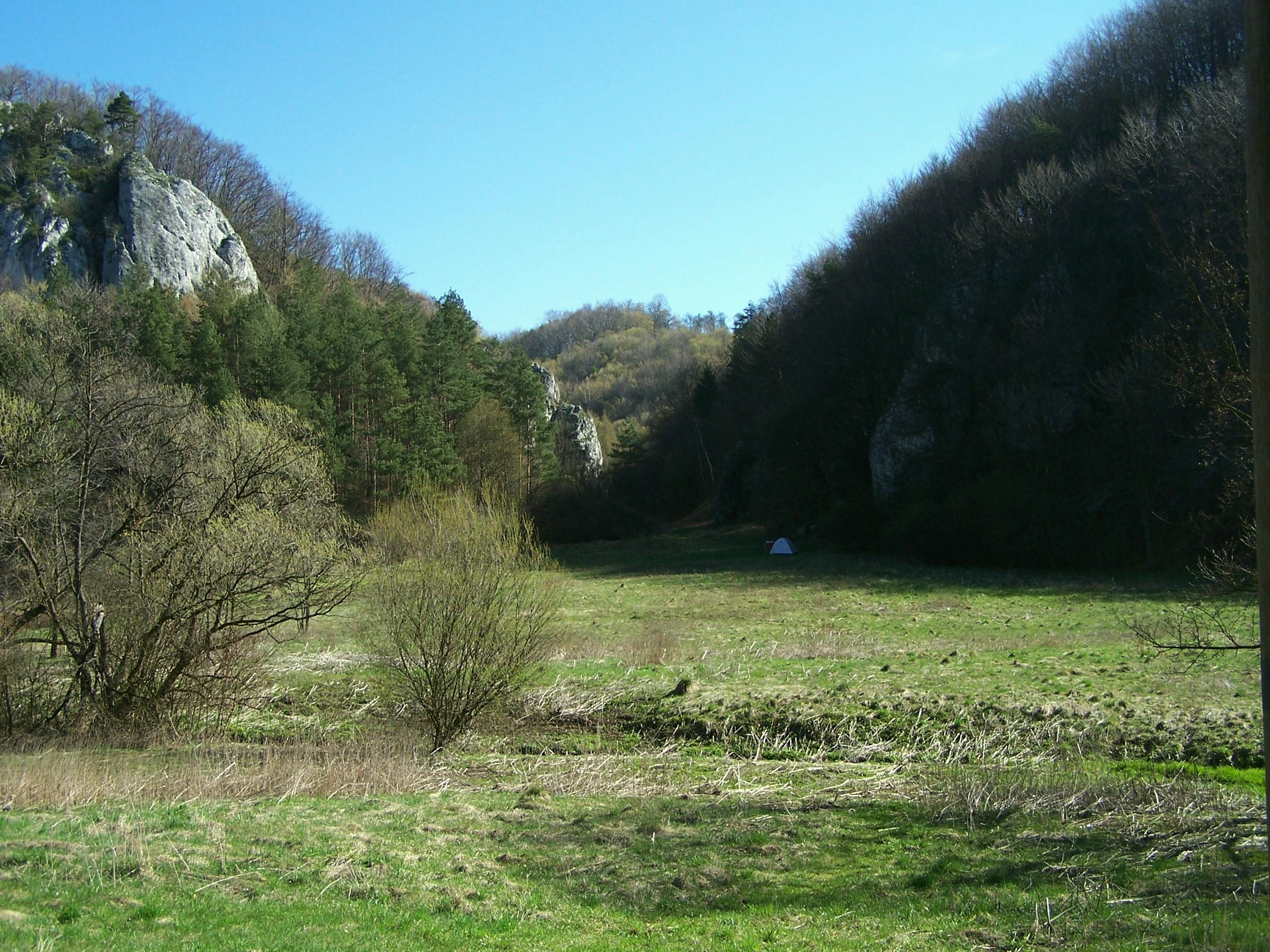 Dolina Będkowska (Park Krajobrazowy Dolinki Krakowskie)